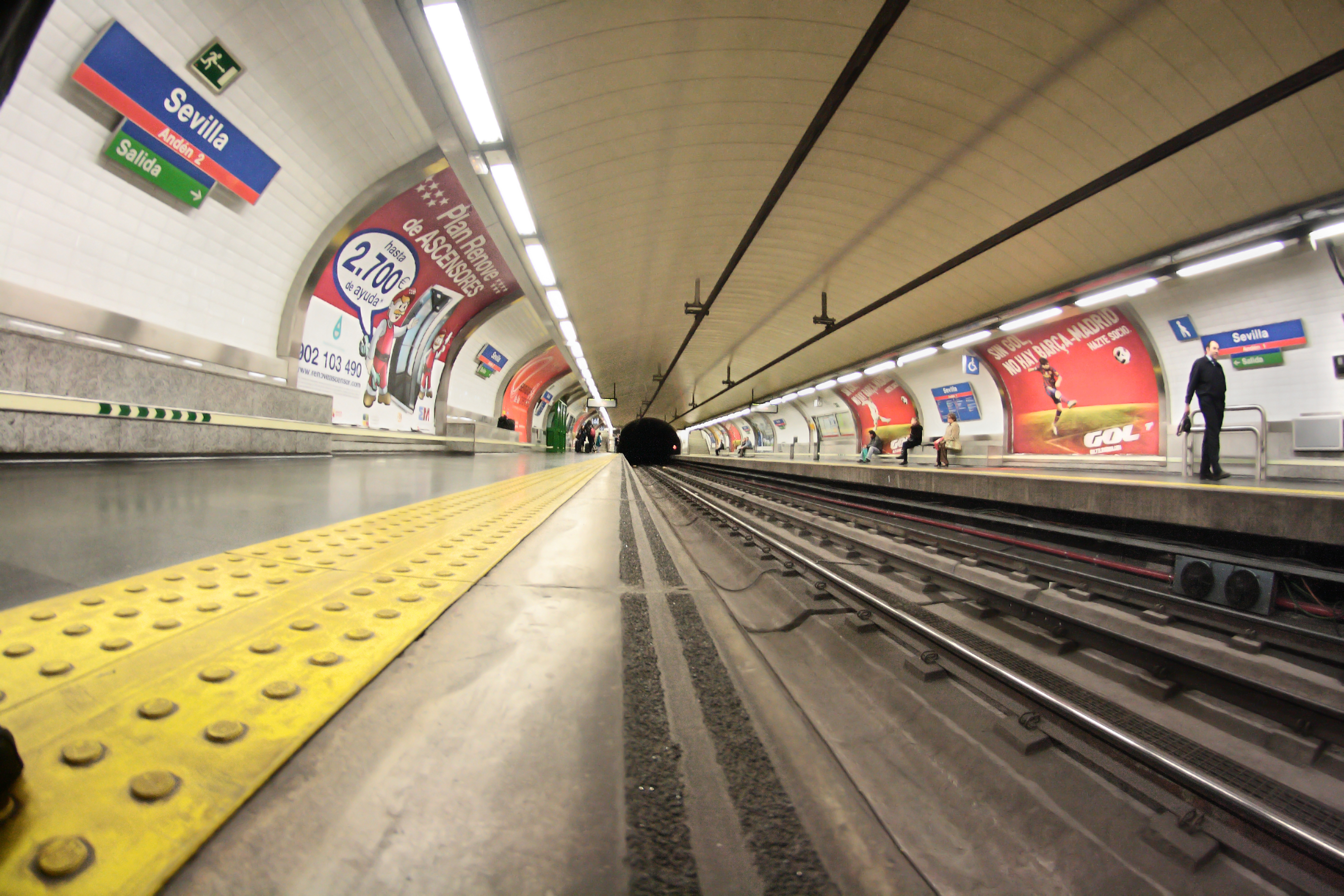 Madrid, España